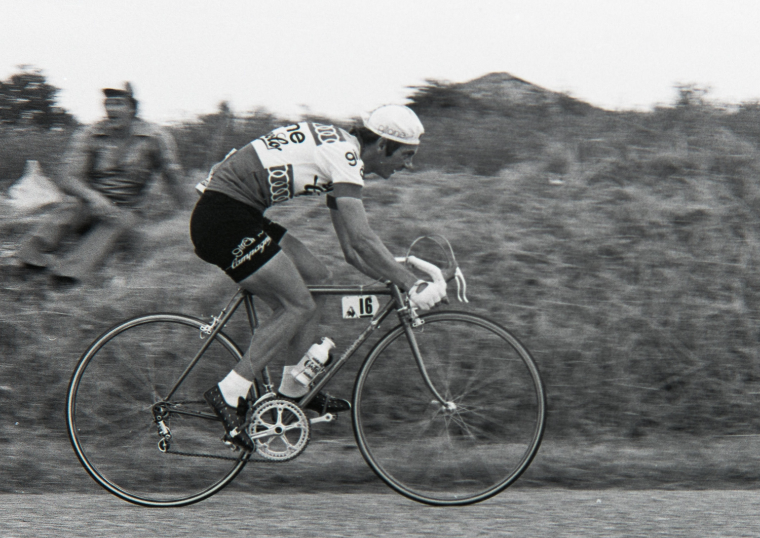 Raymond Martin durant le Tour de France 1976. Photographie : René Milanese